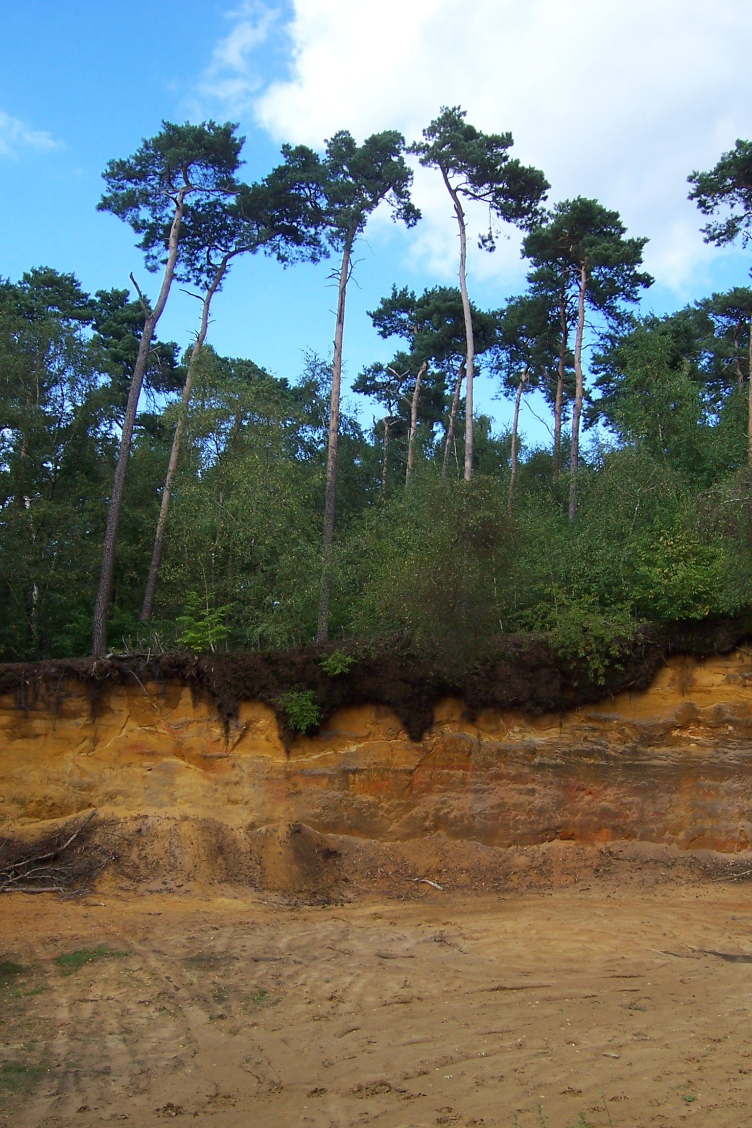 Sandabbruch am Hünsberg Coesfelder Heide; Coesfeld NRW Germany.